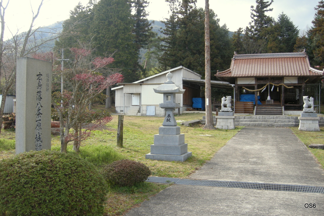 東広島市志和神社